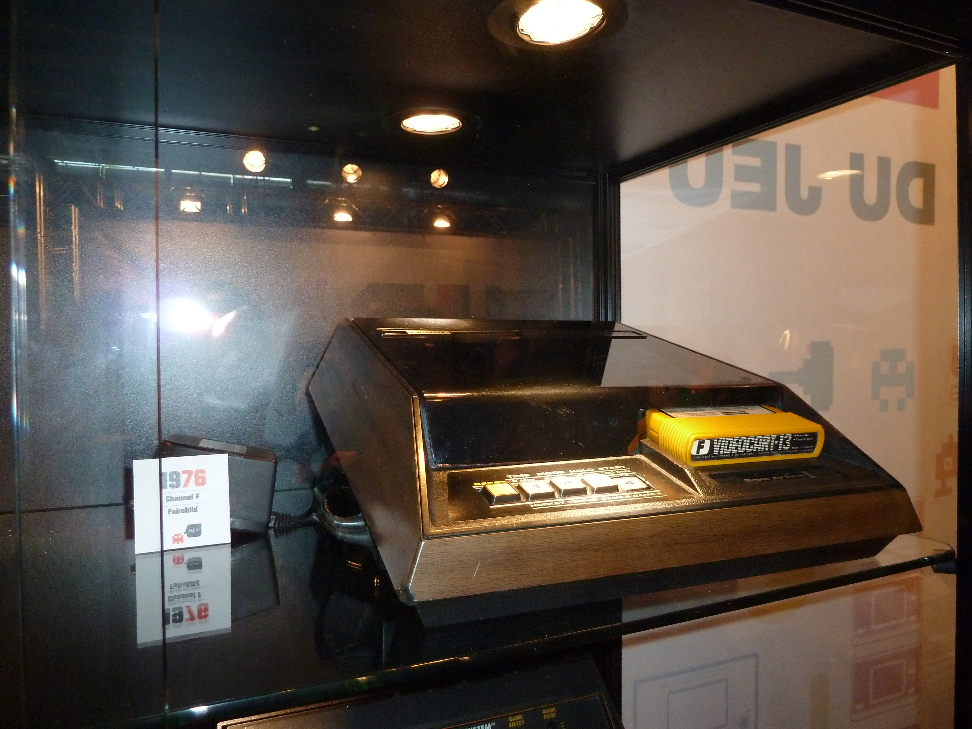 Console Fairchild Channel F présentée au Festival du Jeu Vidéo par le musée du jeu vidéo